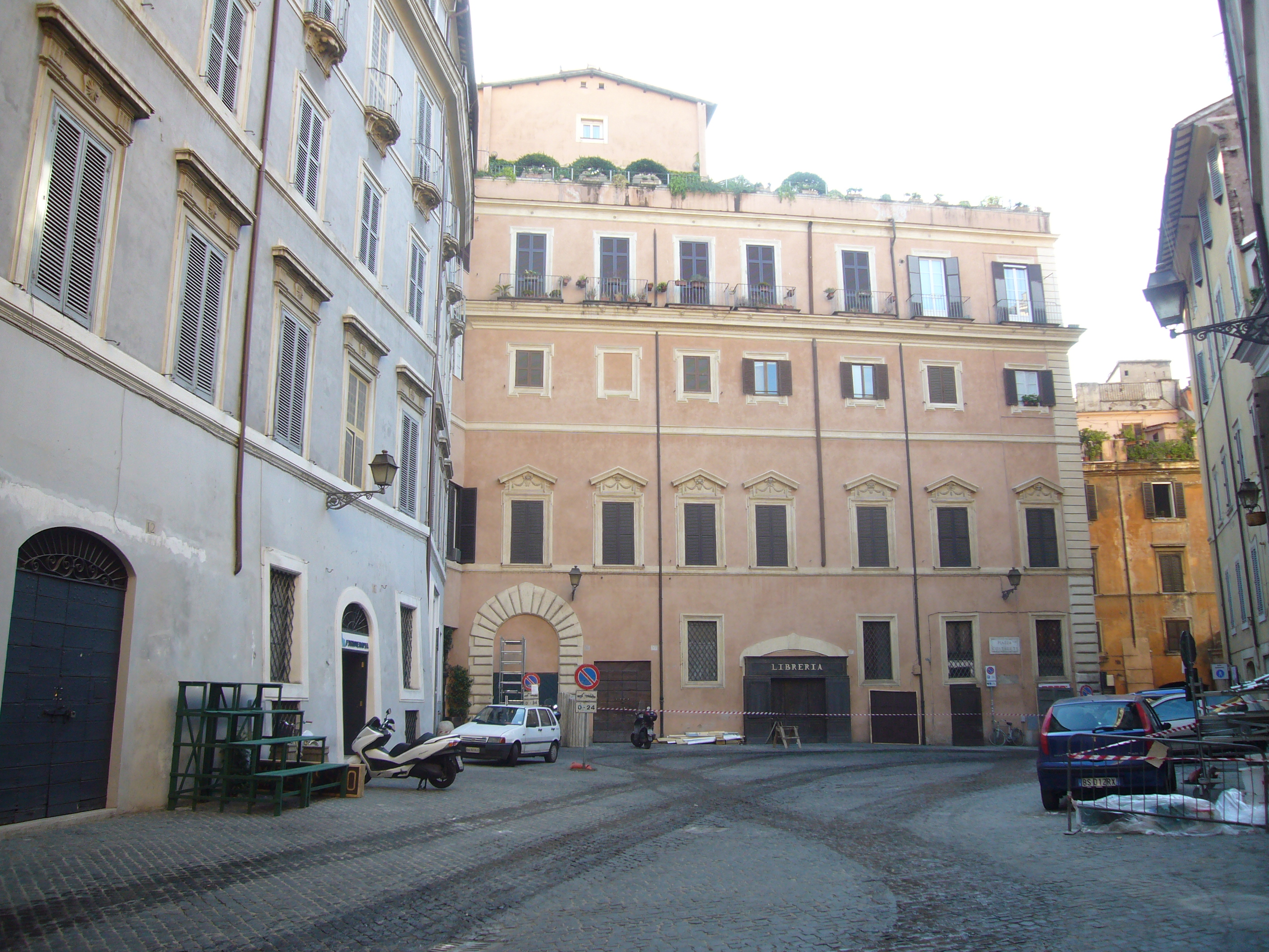 Roma, piazza Costaguti, liberata e pronta per girare in esterni.